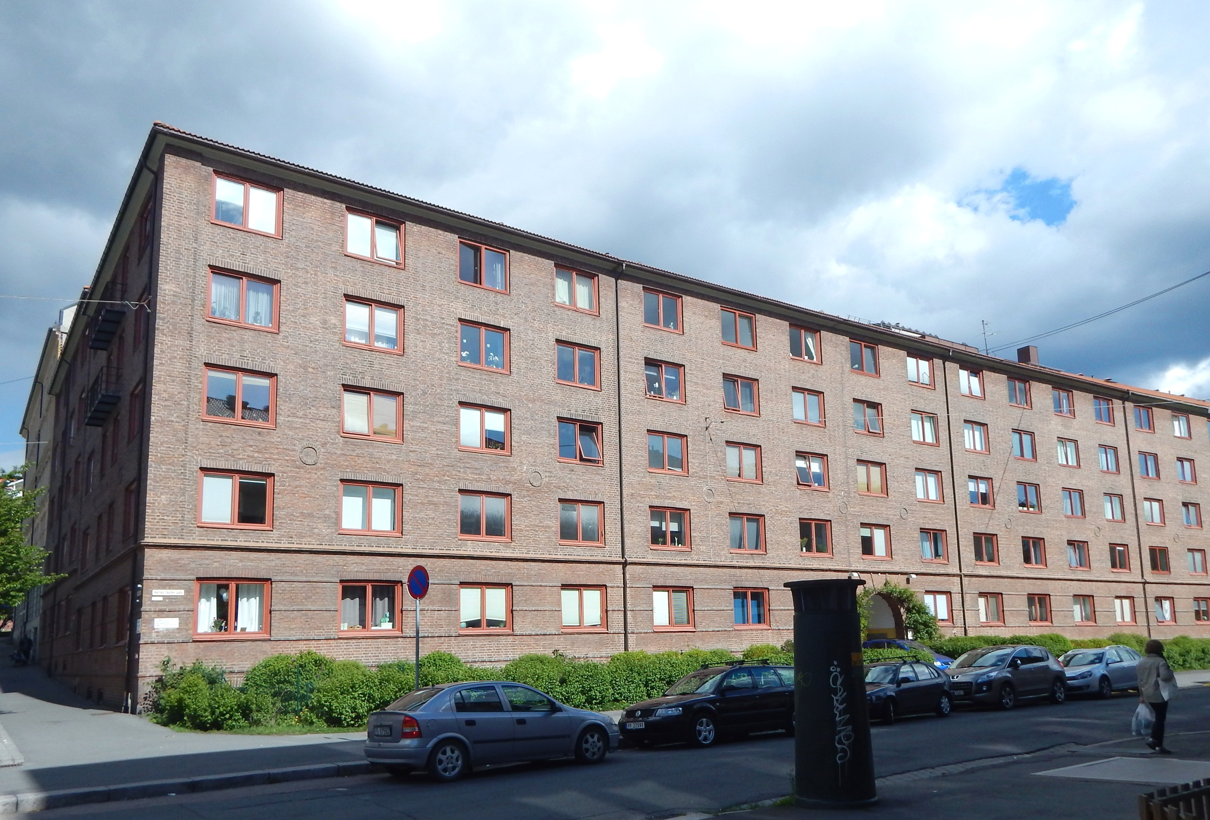 Hertug Skules gate, en del av kvartalet med adresse nr. 2–24. Arkitekt: Ragnvald Tønsager (1928).